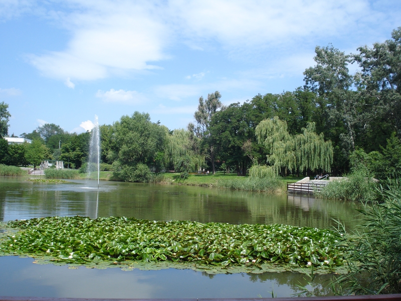 Inowrocław - Park Solanki staw